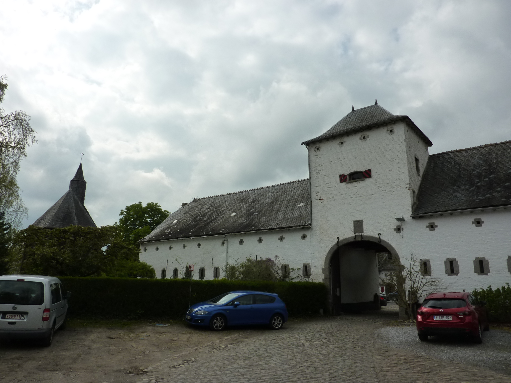 Commanderie de la Neuve-Court (Wavre)